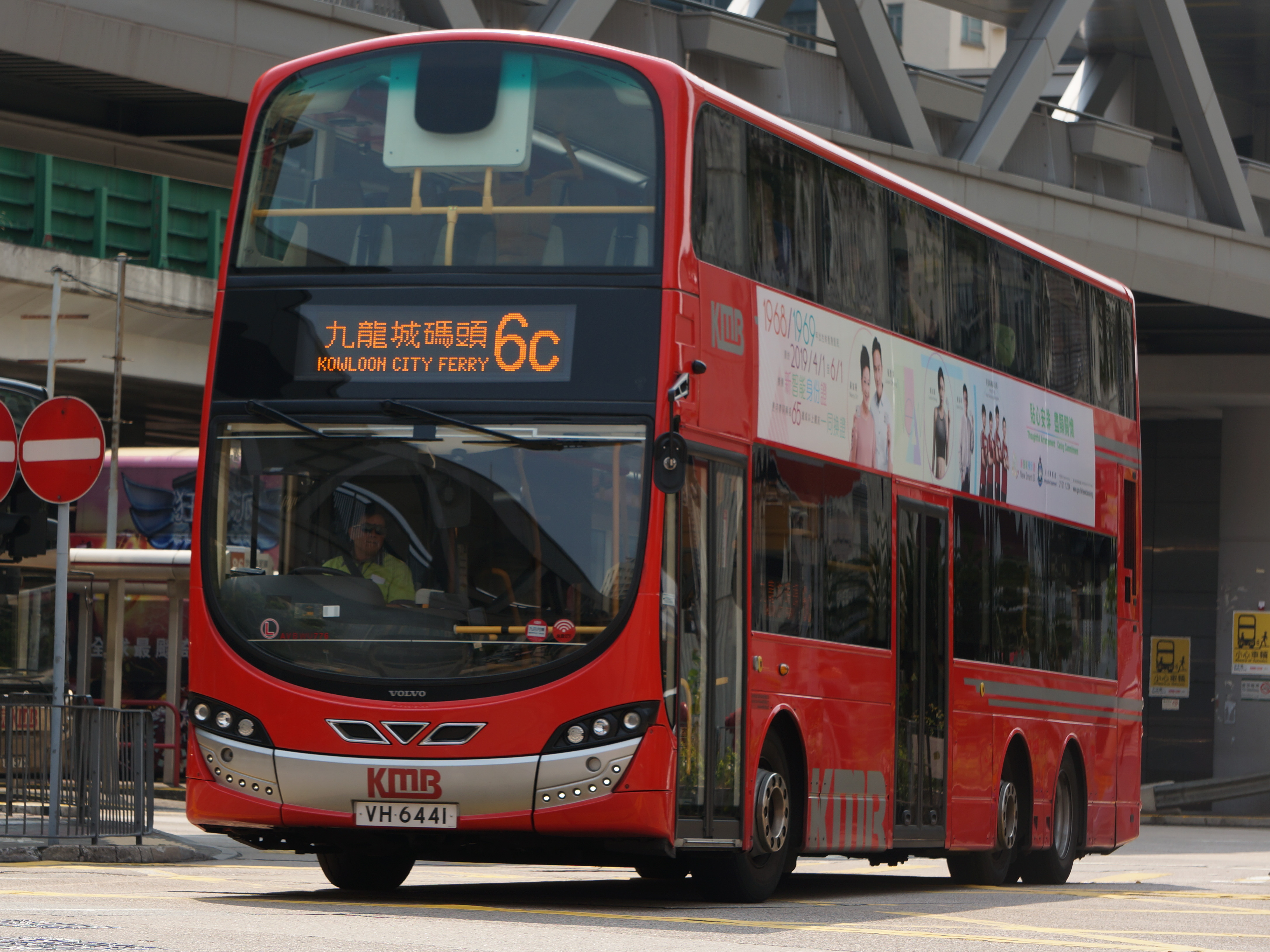 九龍巴士6C線